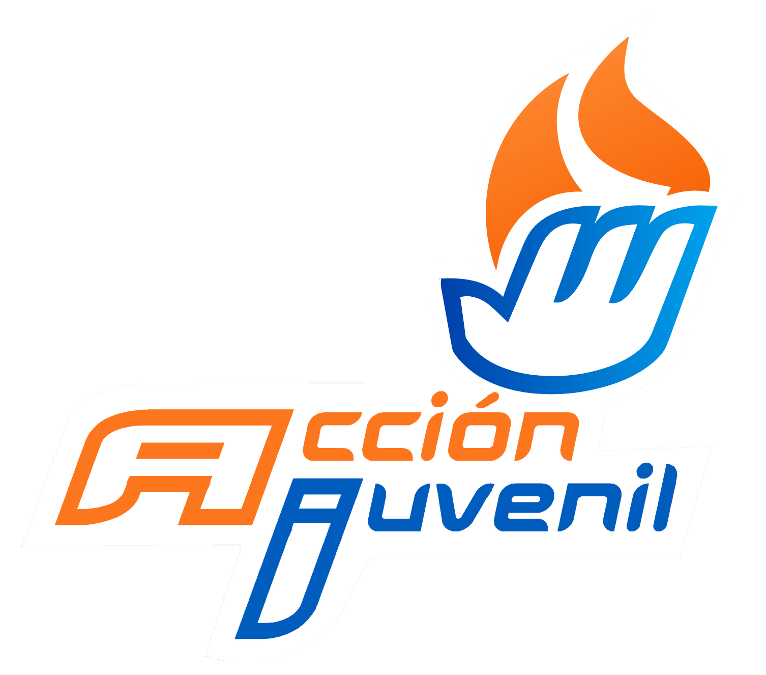 Logotipo general de la Secretaría de Acción Juvenil del Partido Acción Nacional de México.